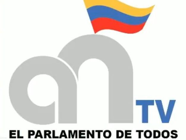 Es el logo más reciente del canal oficial del parlamento venezolano.